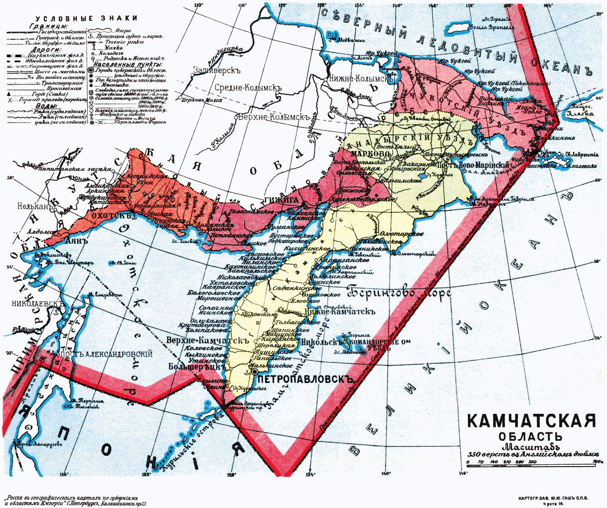 Карта Камчатской области, 1913